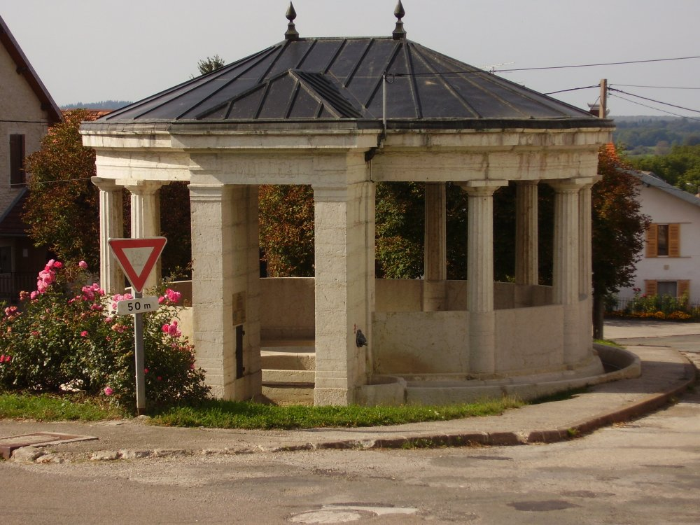 Fontaine de Loray - photos prise par F. Konig septembre 2006